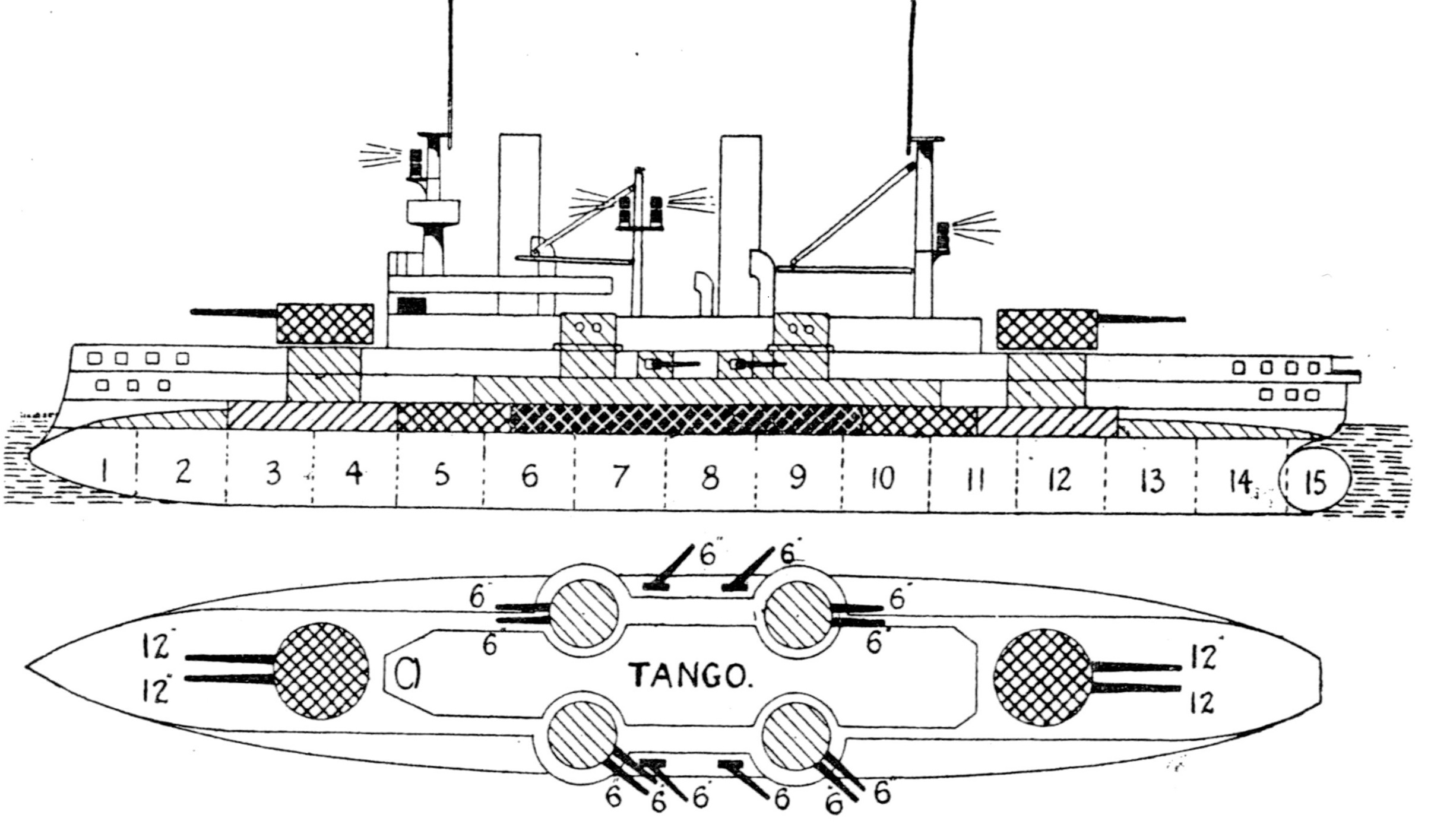 ロシア帝国海軍の戦艦ポルタヴァ、のち大日本帝国海軍の戦艦丹後、のちロシア海軍の戦艦チェスマ